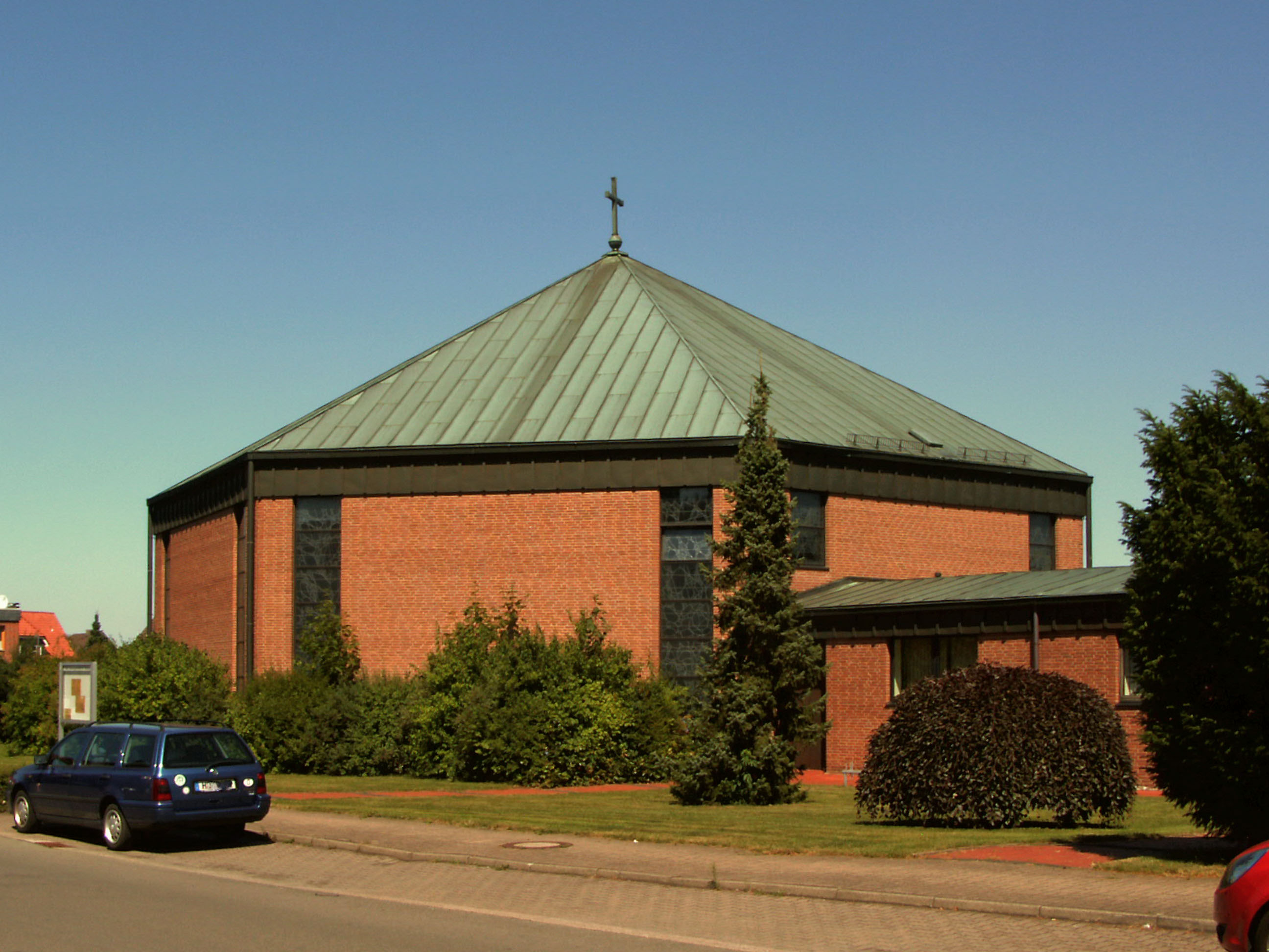 Katholische Kirche St. Barbara in Barsinghausen, Region Hannover.